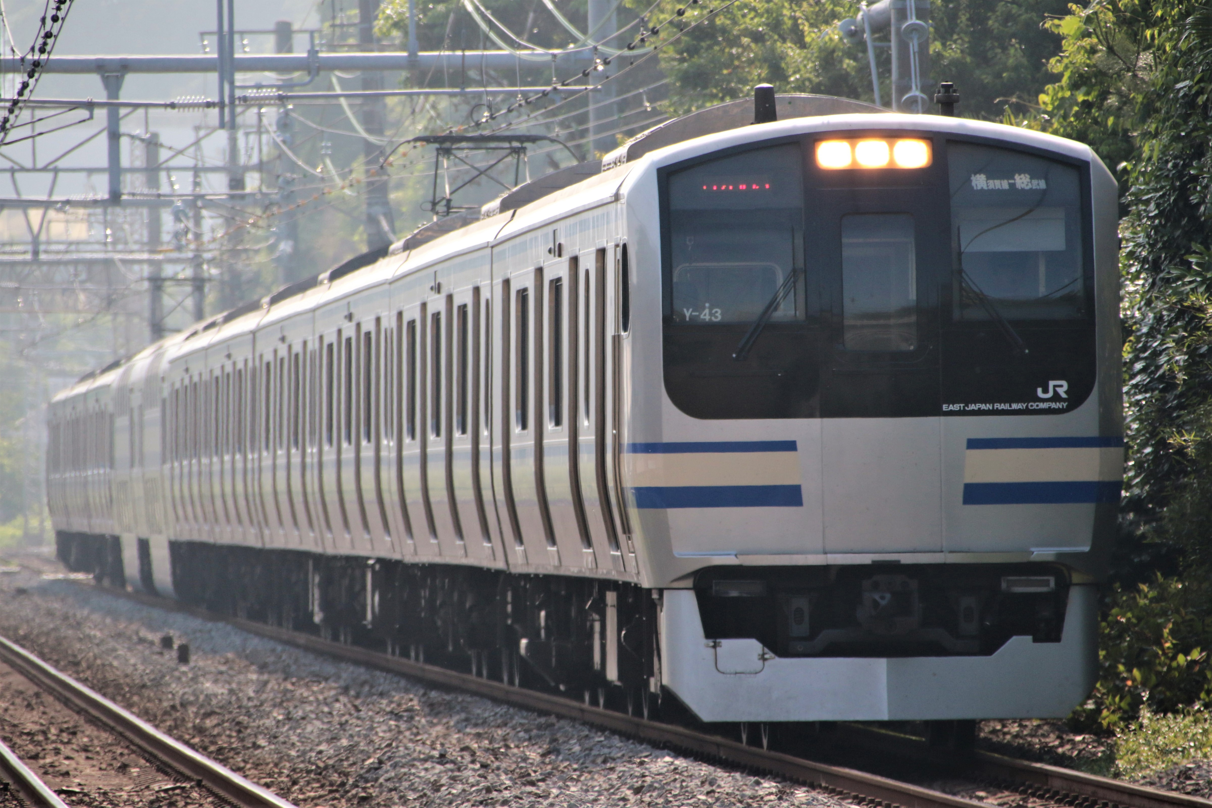 横須賀線で使用されるE217系電車。田浦－東逗子間にて